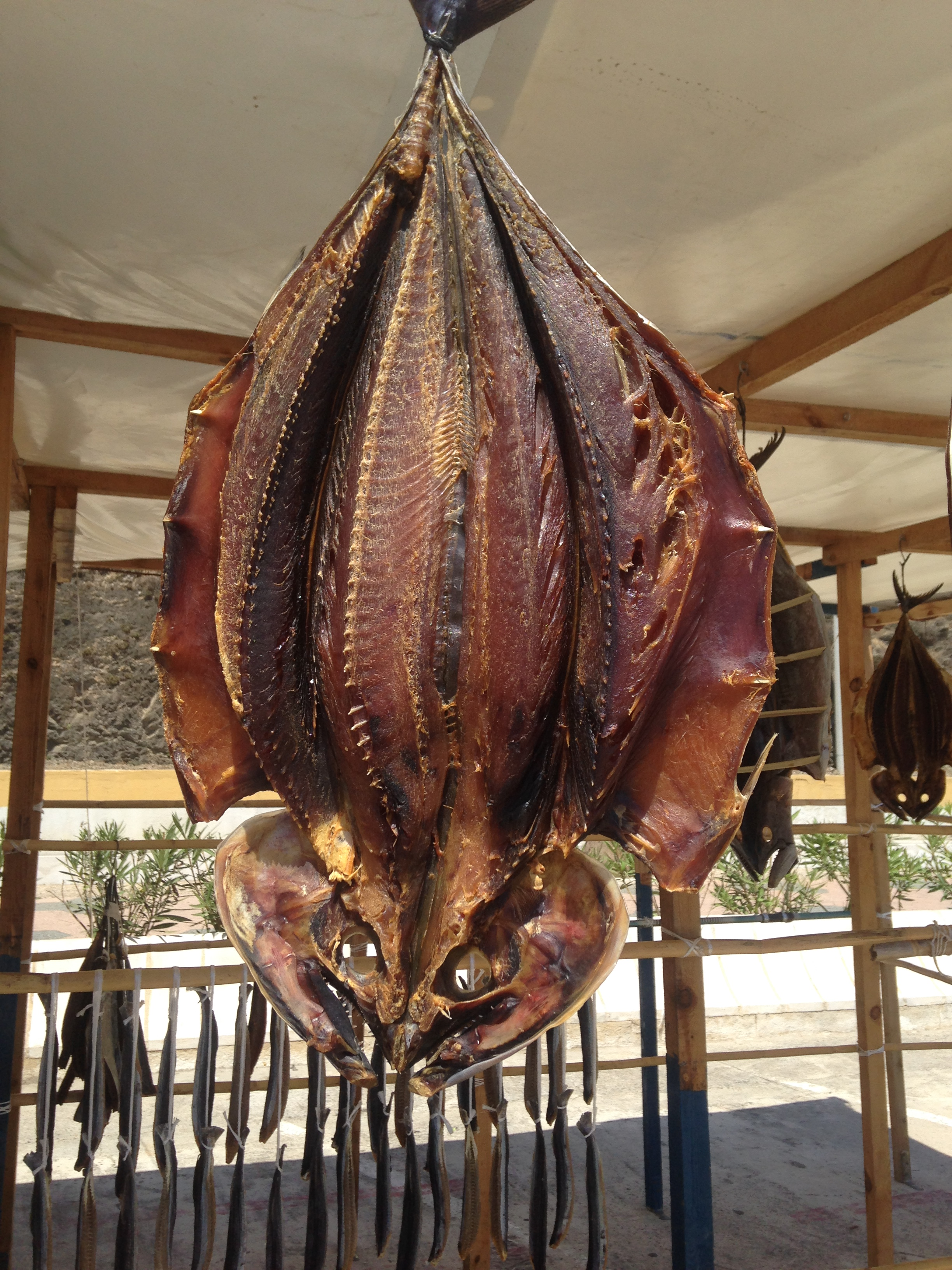 Bonito curándose en el secadero